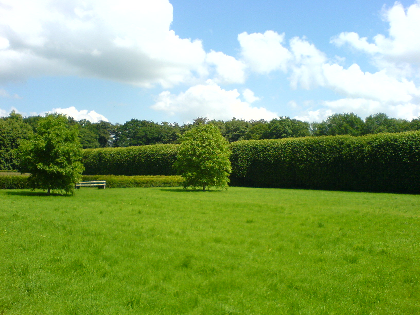 Jersbek Hecke